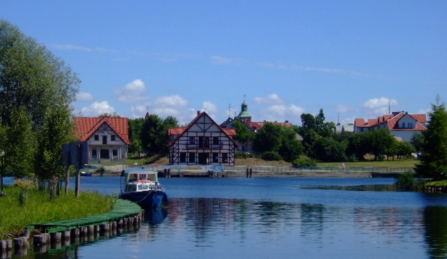 Węgorzewo (Angerburg) - Blick auf die Stadt vom Kanal zum Mauersee